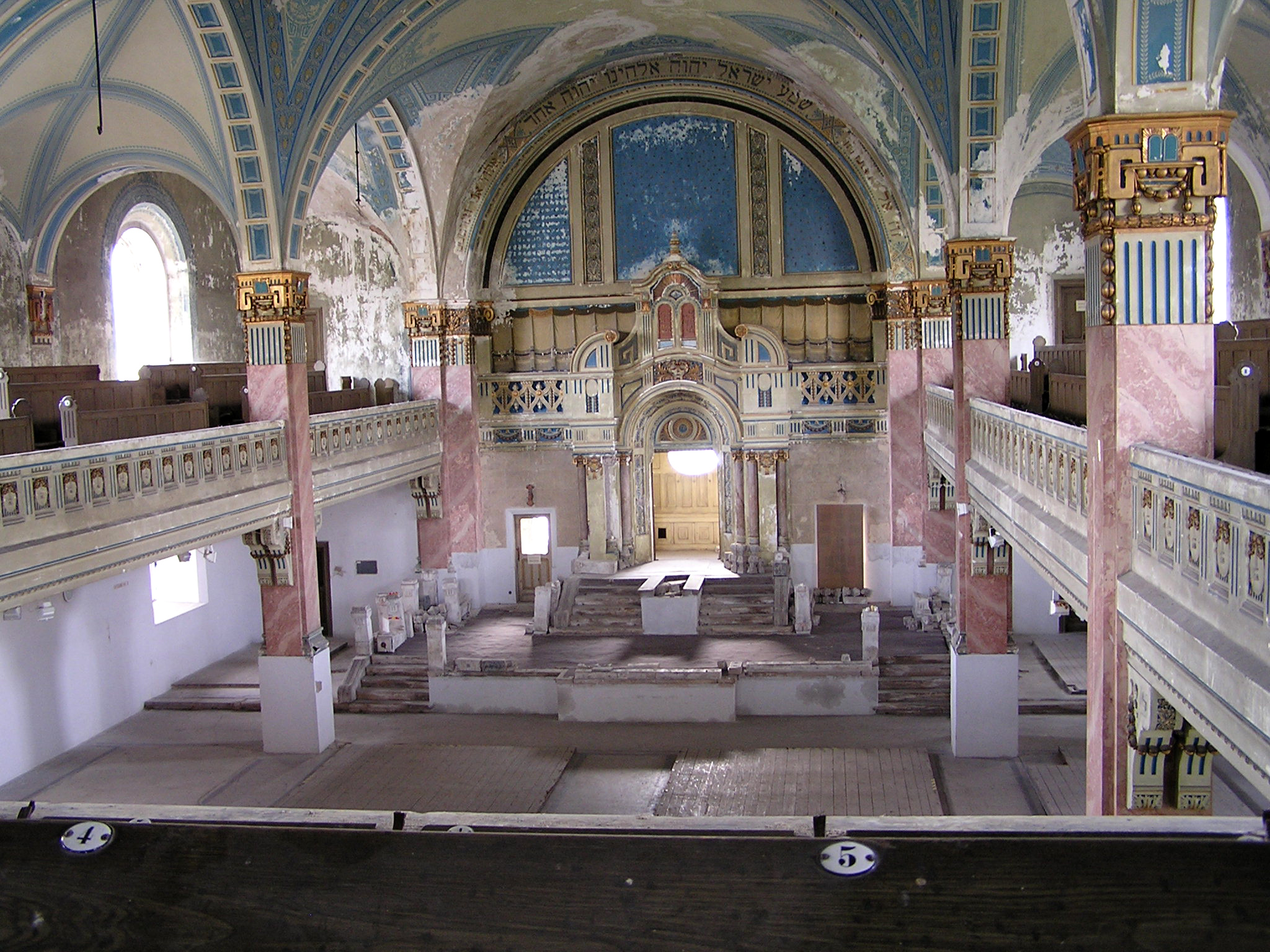 Synagóga